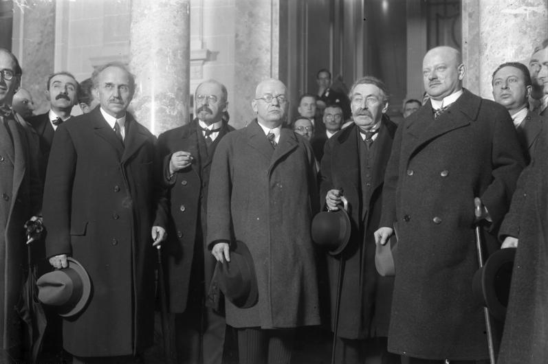 Deutschlands Einritt in den Volkerbund! Neueste Aufnahmen vom ersten Sitzungstage des Völkerbundes in Genf. Die deutschen, französischen und belgischen Delegationsführer nach der ersten Besprechung im Hotel "Beau Rivage". Von rechts nach links: Aussenminister Dr. [Gustav] Stresemann, Minister-Präsident [Aristide] Briand, Reichskanzler Dr. [Hans] Luther, der belgische Minister-Präsident [Emile] Vandervelde, und der Führer der italienischen Delegation [Vittorio] Scialoja. ("Germany's entry into the League of Nations! Latest recordings from the first meeting of the League of Nations in Geneva. The German, French and Belgian delegation leaders after the first meeting at the hotel "Beau Rivage". From right to left: Foreign Minister Dr. [Gustav] Stresemann, Minister-President [Aristide] Briand, Reich Chancellor [Hans] Luther, the Belgian Minister-President [Emile] Vandervelde, and the leader of the Italian delegation [Vittorio] Scialoglia.")